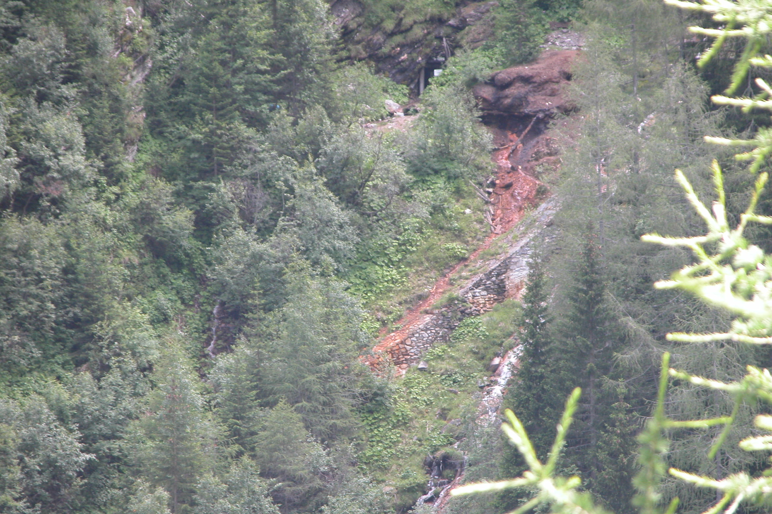 Former Arsen Mine